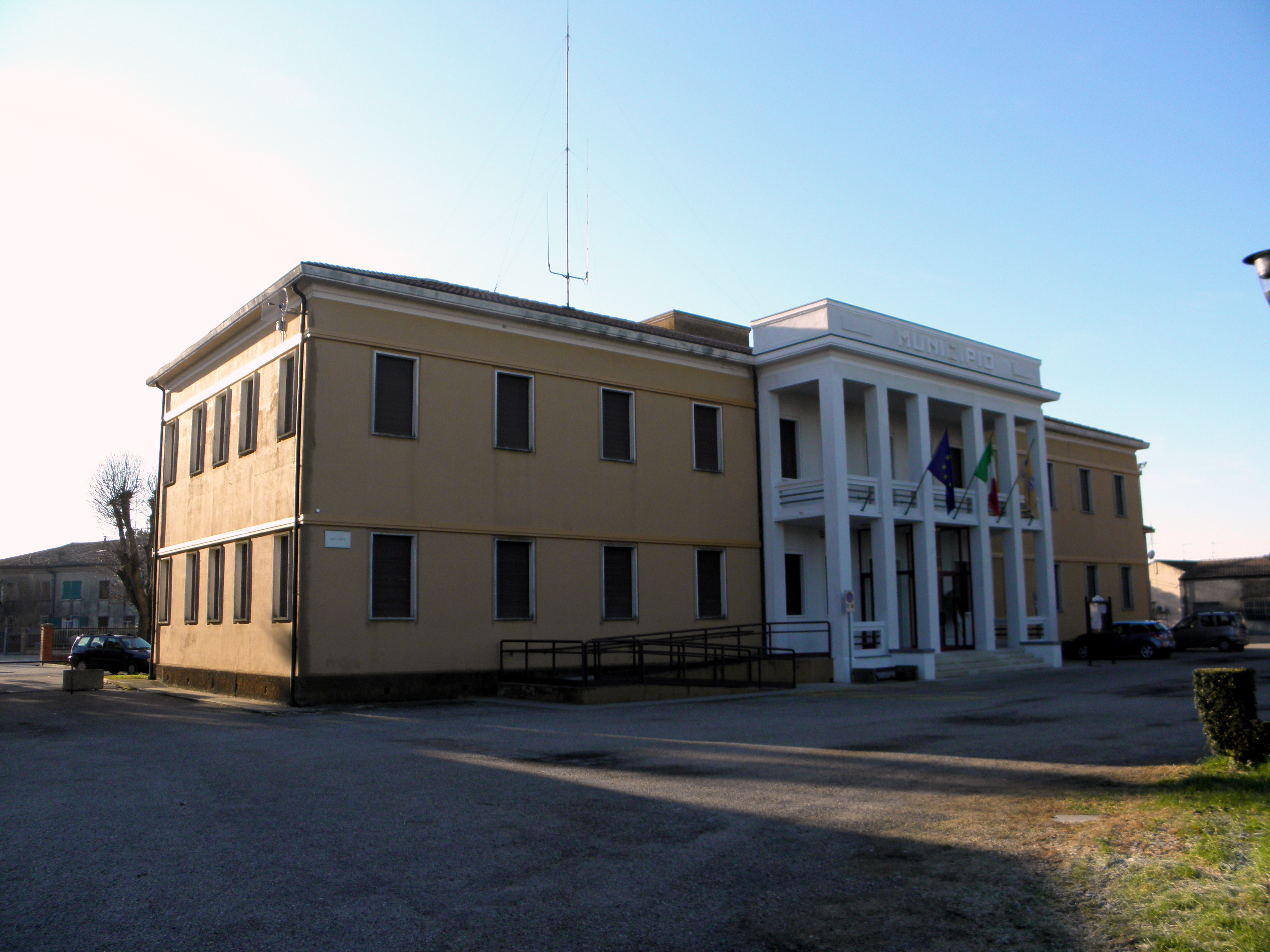 Ro, la palazzina municipale.